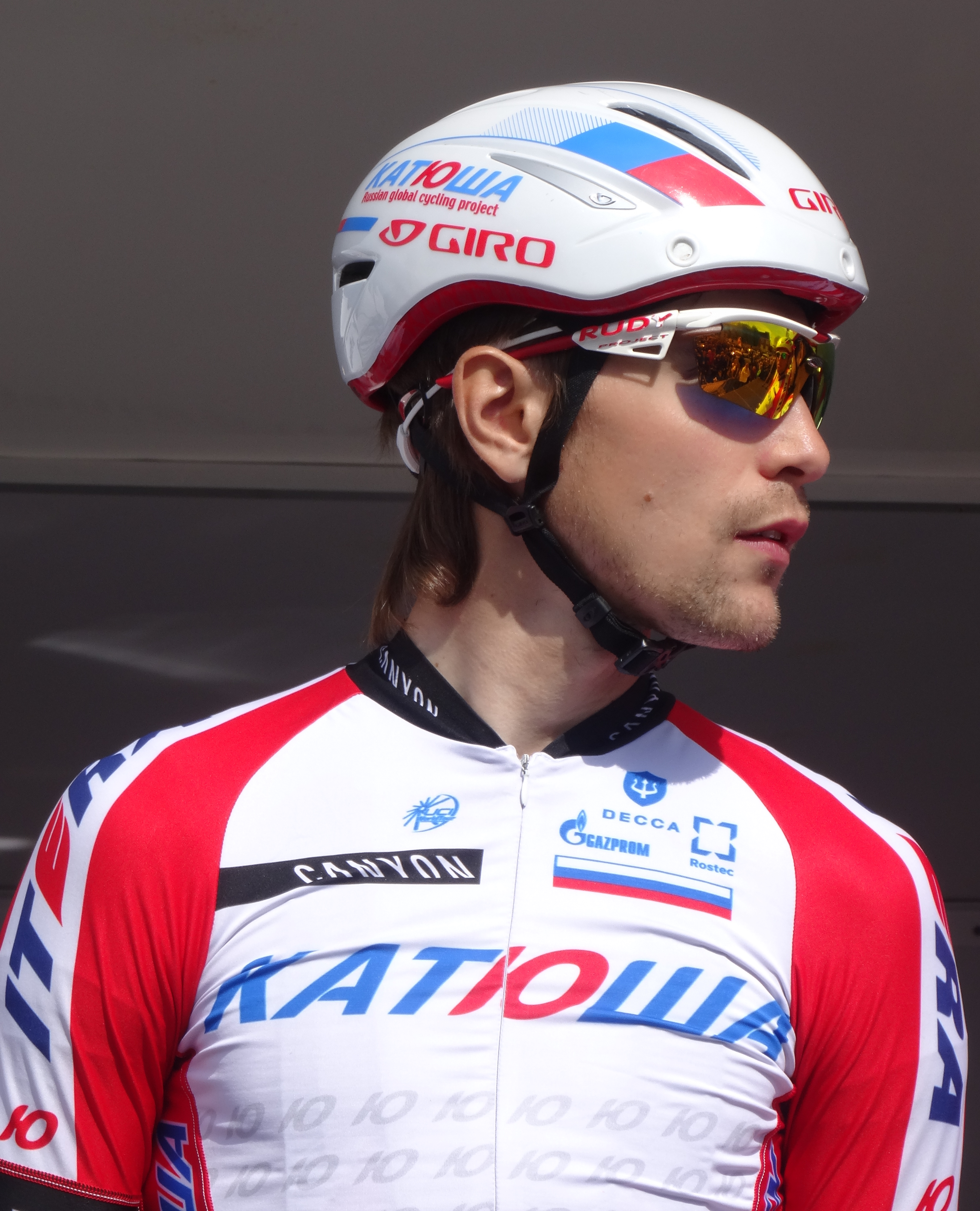 Reportage réalisé le jeudi 17 avril à l'occasion du départ et de l'arrivée du Grand Prix de Denain 2014 à Denain, Nord, Nord-Pas-de-Calais, France.